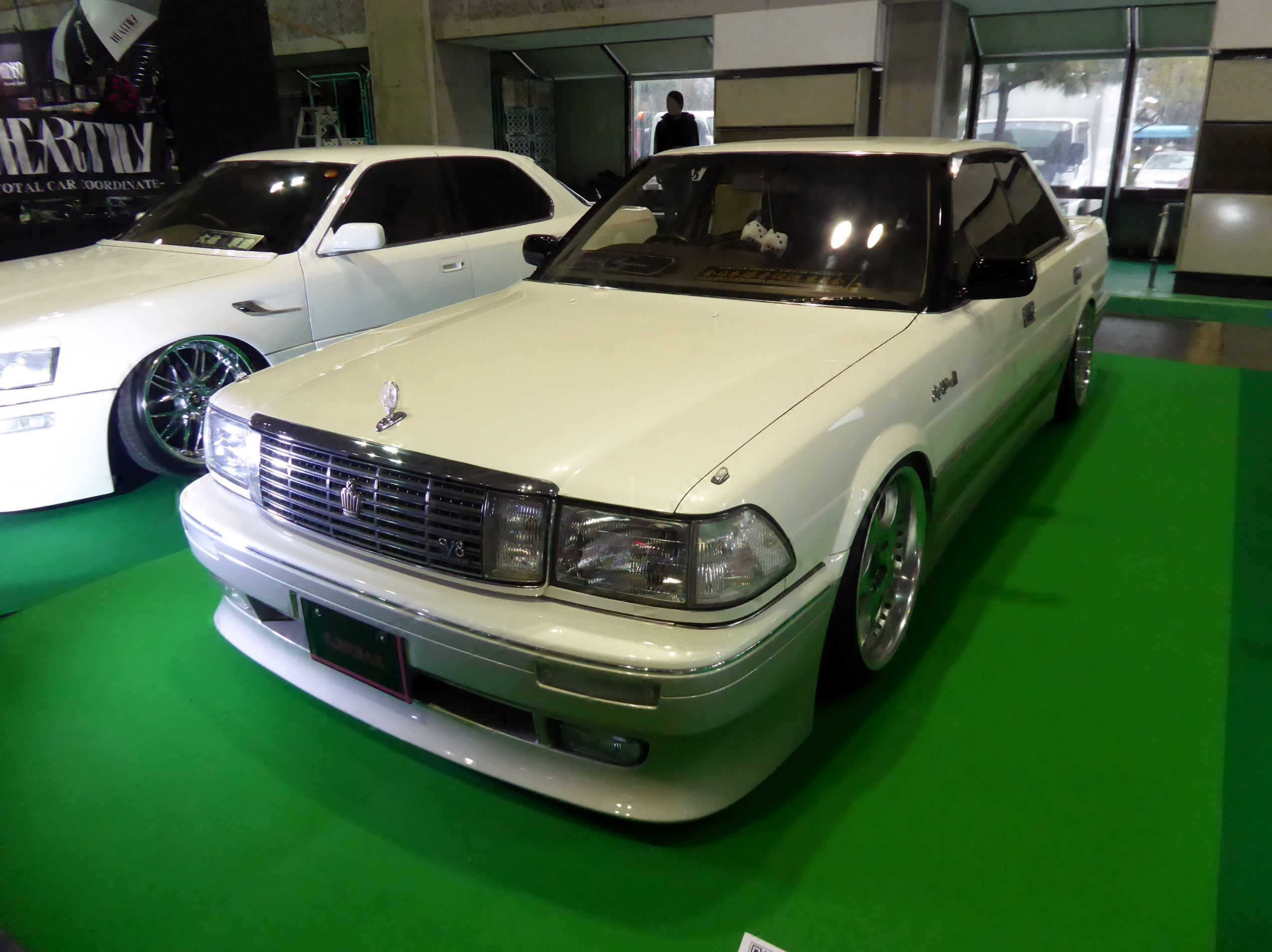 大阪オートメッセ2018に於いて憧れだったあの頃のクラウンを撮影。